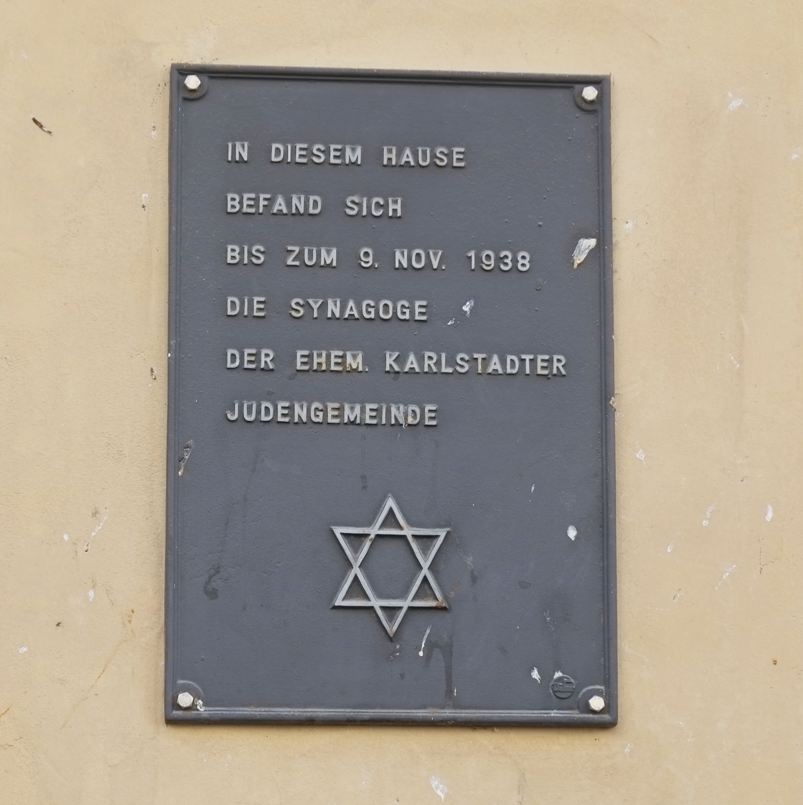 Haus Hauptstraße 24 in Karlstadt im Main-Spessart-Kreis (Bayern, Deutschland)